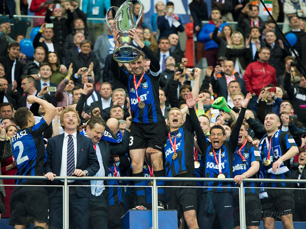 02.05.2014 Warszawa , final Pucharu Polski mecz KGHM Zaglebie Lubin - Zawisza Bydgoszcz , n/z Lukasz Skrzynski i zespol Zawiszy z Pucharem fot. P. Dziurman